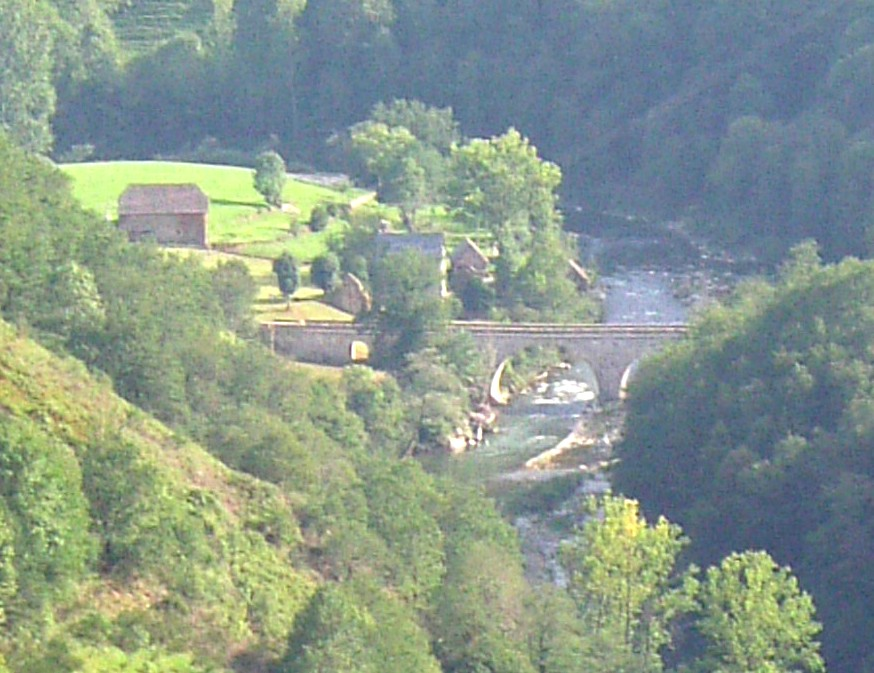 Chipole, commune de Pomayrols (Aveyron - France).